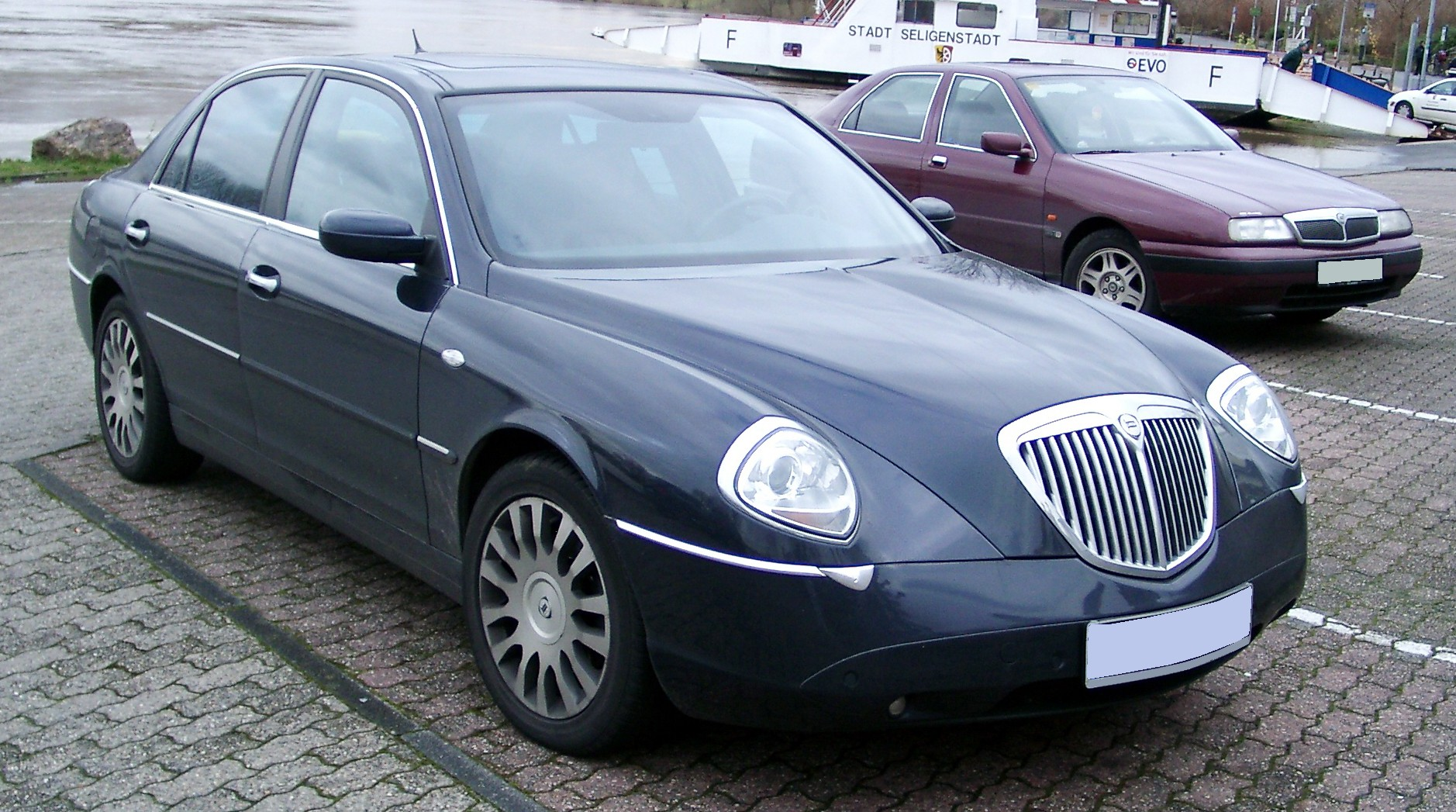 Lancia Thesis neben seinem Vorgänger, dem Lancia Kappa